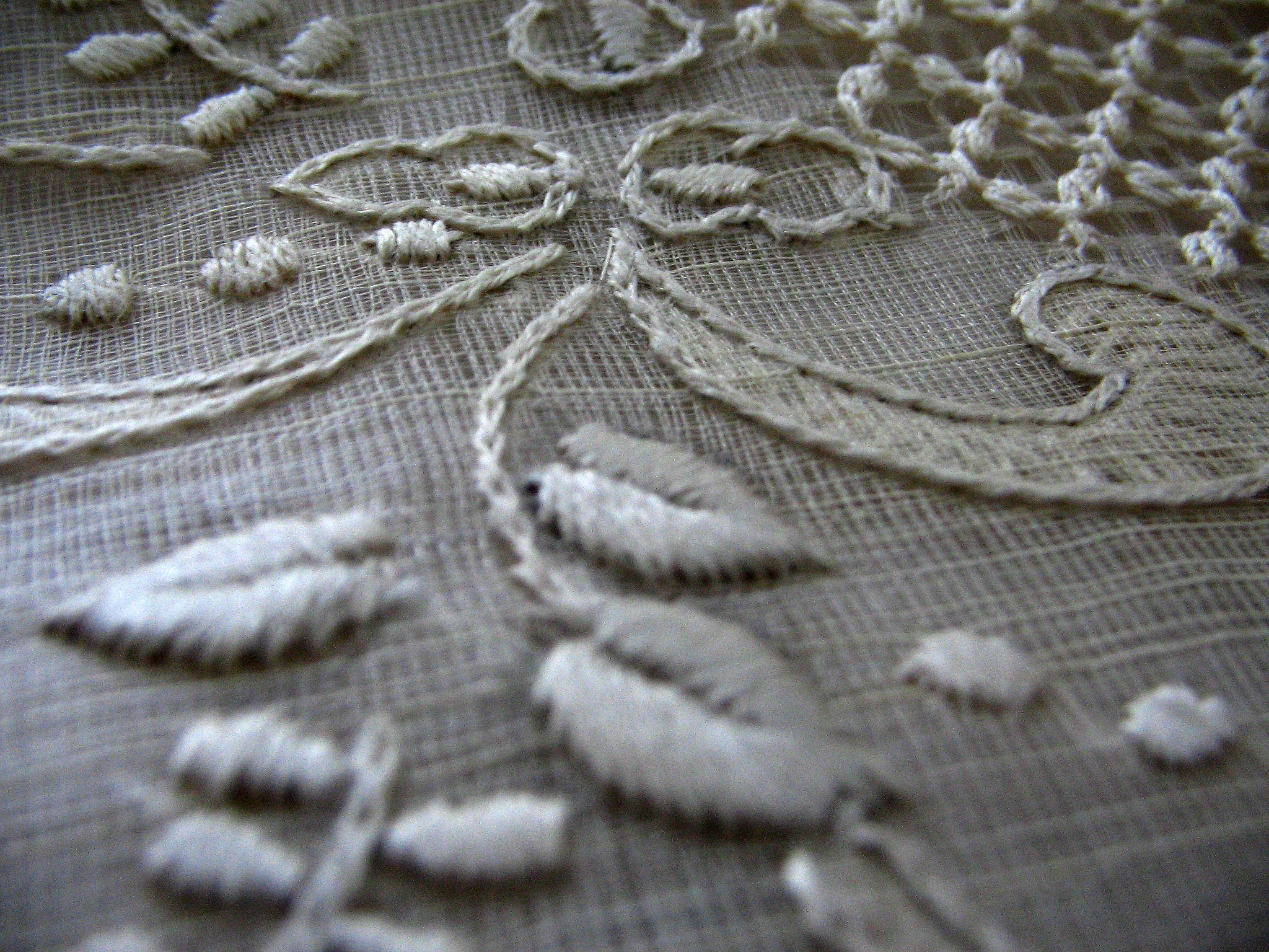 Barong Tagalog made of piña cloth